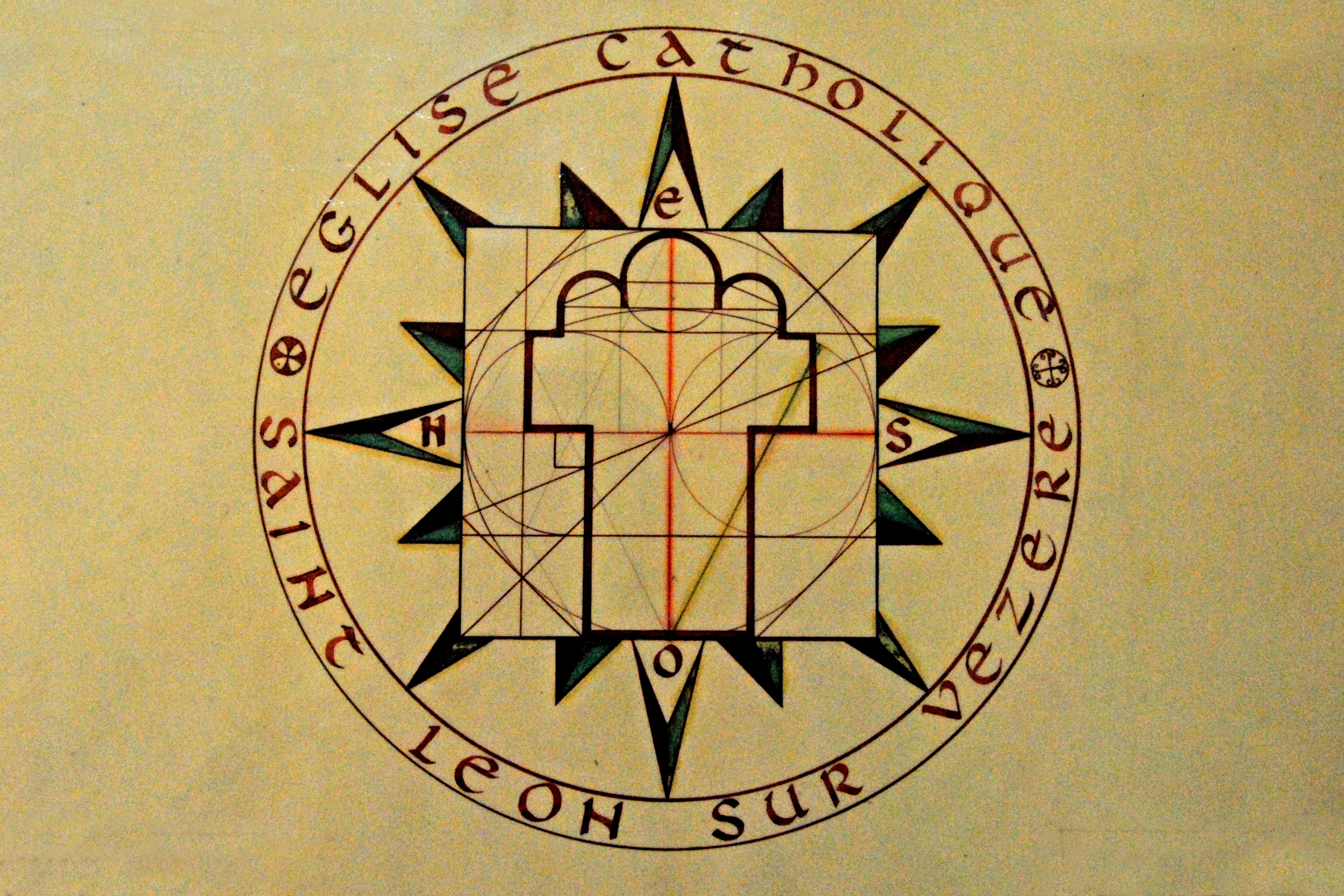 Saint-Léon-sur-Vésère, Geometrie des Grundrisses